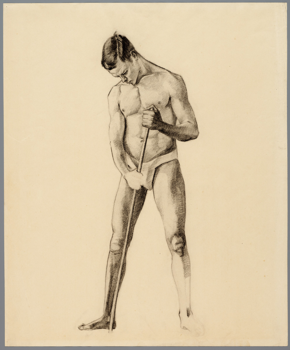 Fré Cohen ca. 1930 modelstudie houtskool [Modelstudie van staande naakte man met stok] 06384 (vrije tekening, getekend; houtskool), grafiek en drukwerk, Joods Historisch Museum, Amsterdam 03684, 11-11-2002, 09:28, 8C, 7998x10660 (0+0), 100%, JHM, 1/80 s, R40.5, G21.3, B29.2